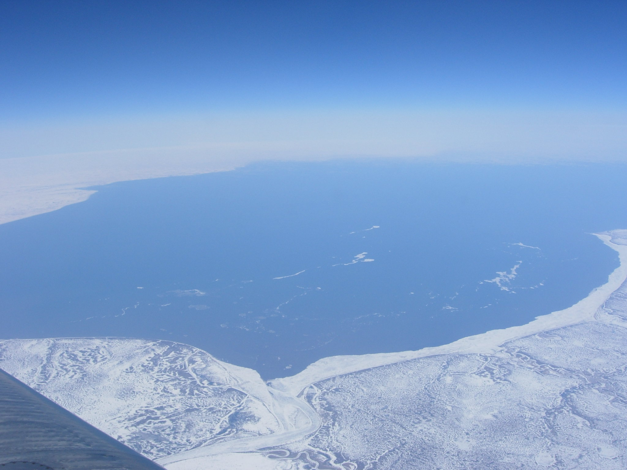 Фотография Чёшской губы